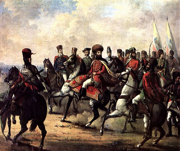 Mihai Viteazul la Călugăreni - de Nicolae Grigorescu ~ 1857. Numele cu care s-a incarcat imaginea este eronat. Pictura apartine lui Nicolae Grigorescu.